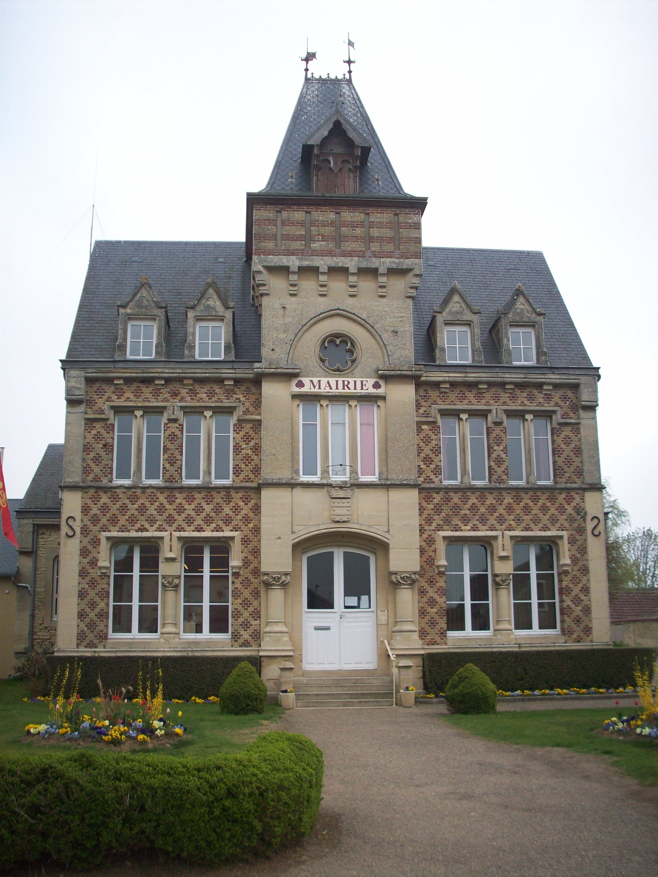 Ancienne mairie d'Écos, mutée en mairie de Vexin-sur-Epte depuis 2017.